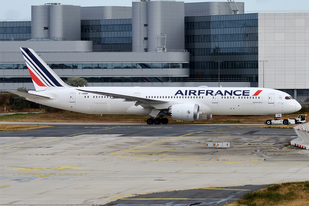 Air France, F-HRBF, Boeing 787-9 Dreamliner